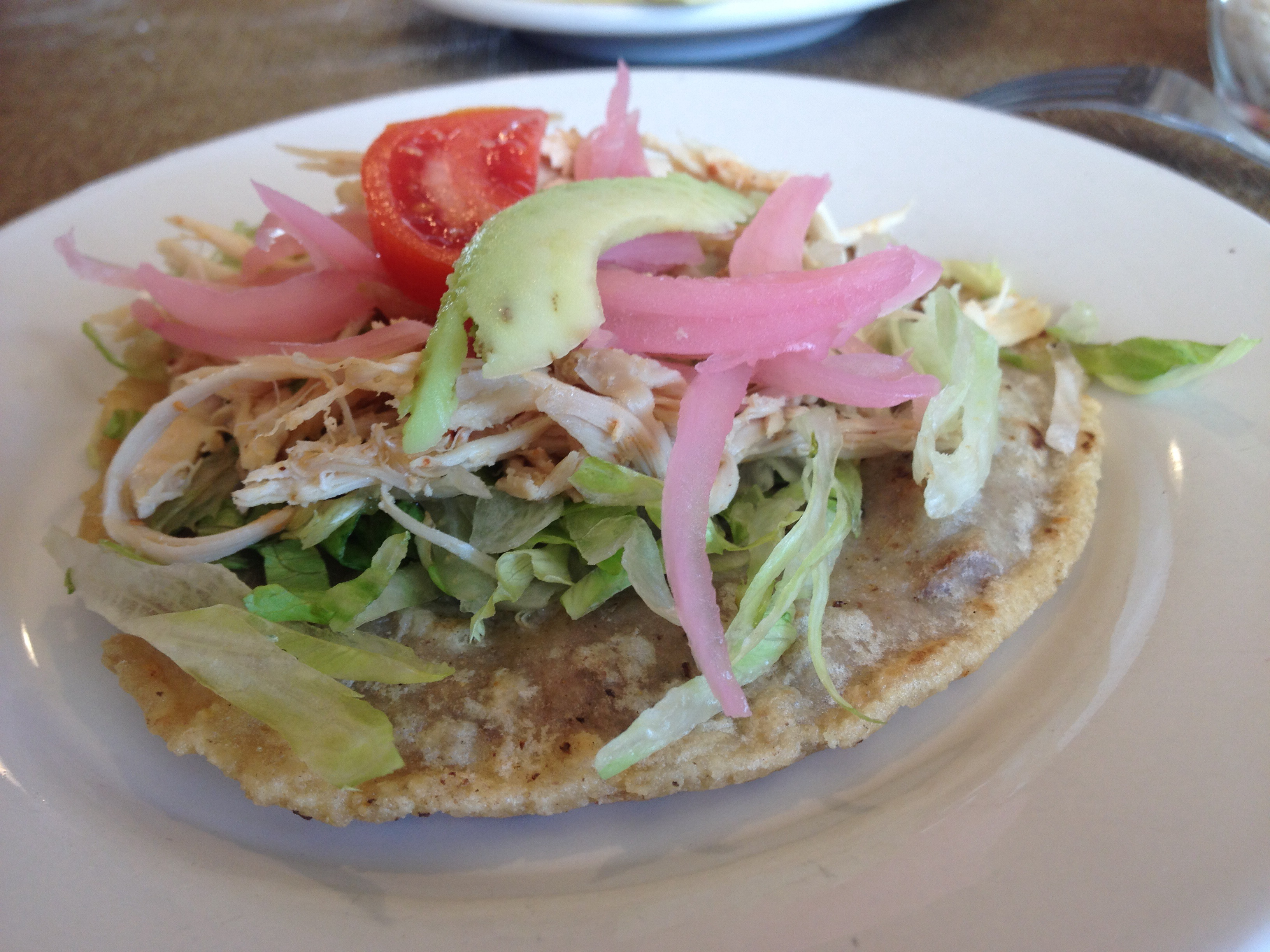 Panucho, antojito mexicano oriundo de Yucatán.